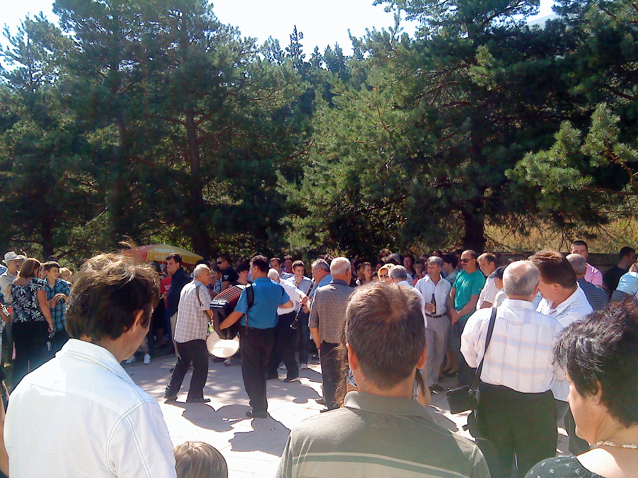 Ден голема богородица цтква Св.Богородица превој Ѓавато